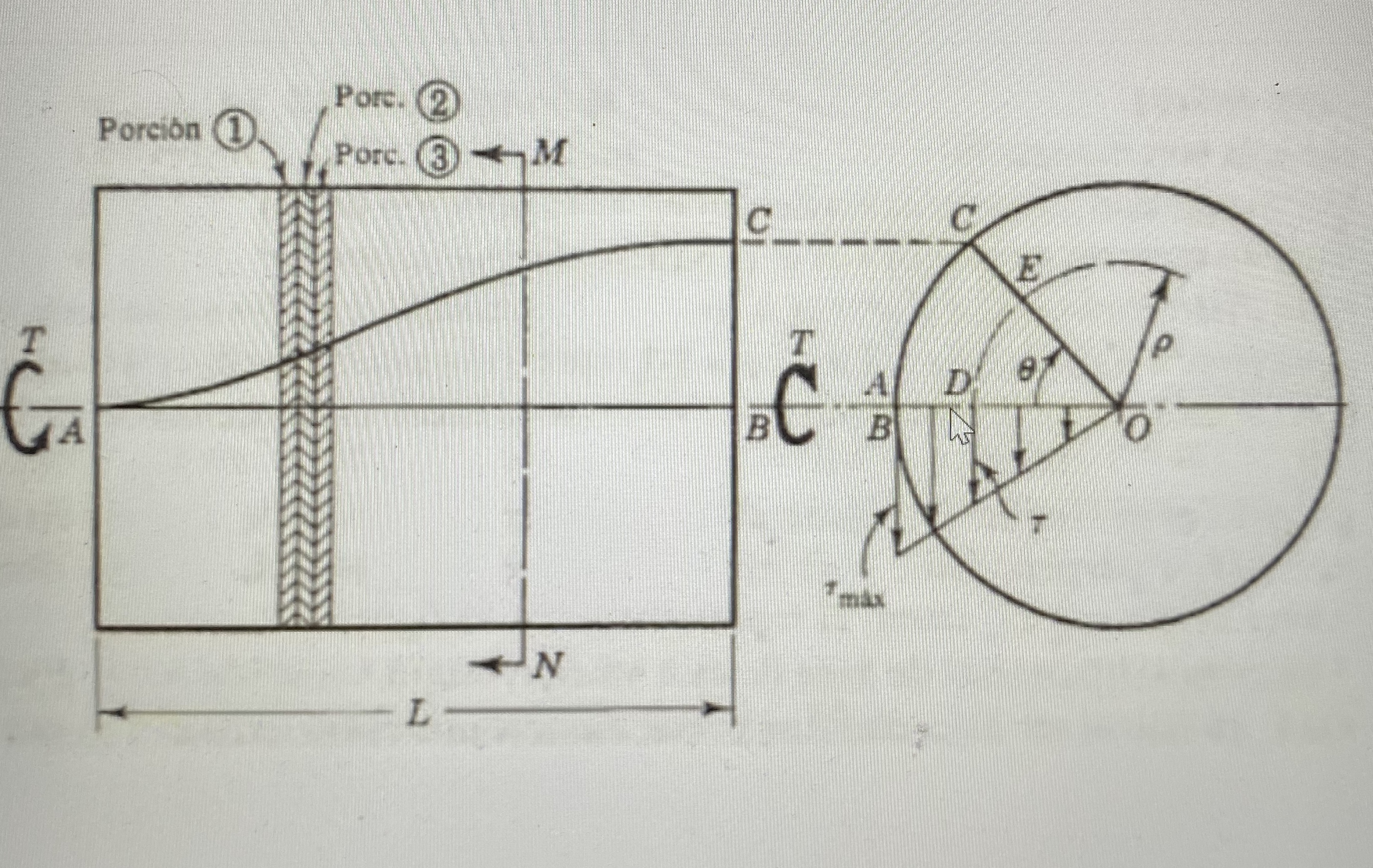 Argazki honetan ikusten ditugu bihurdurazko parte batzuk